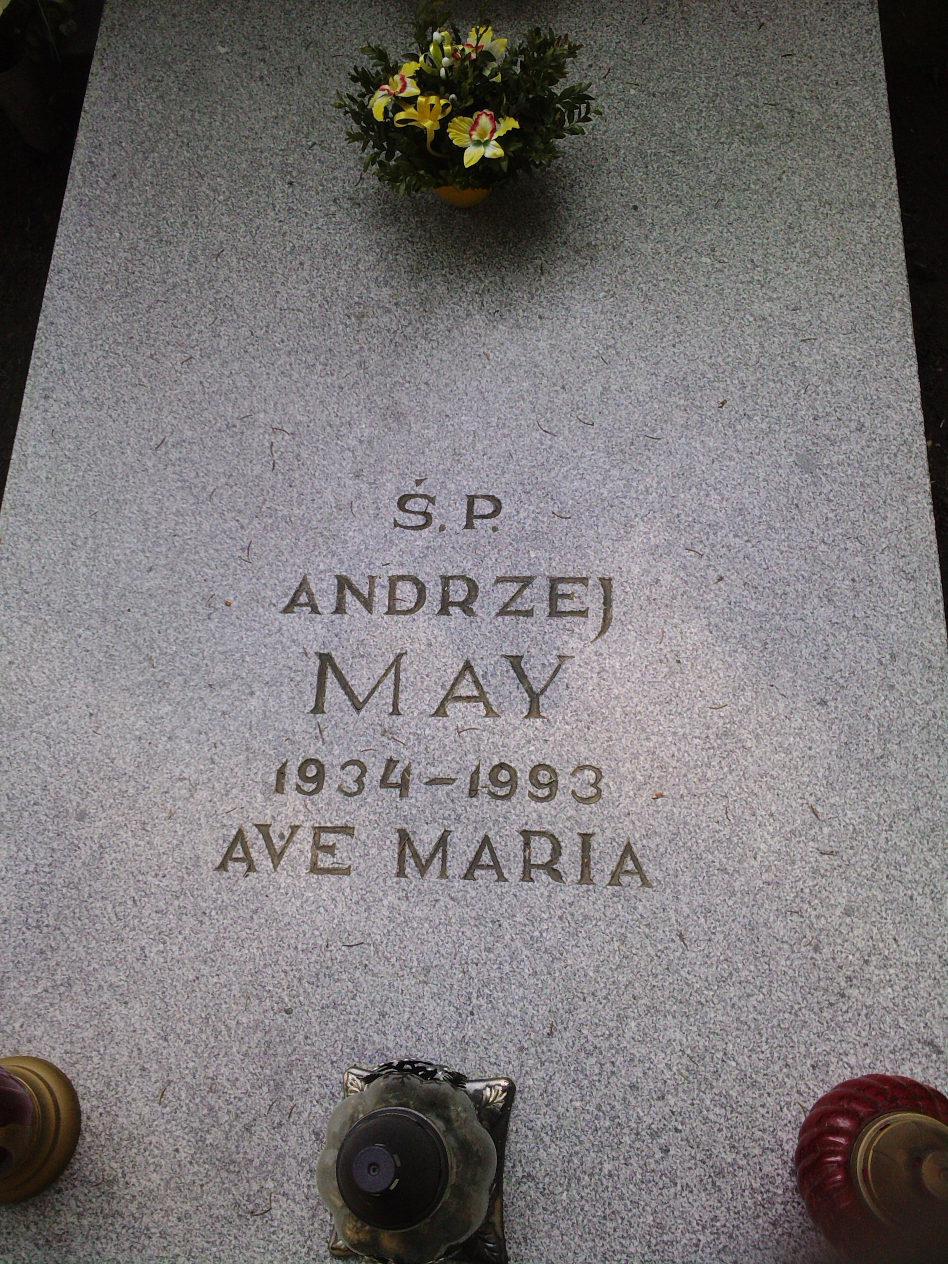 Grób Andrzeja Maya na Cmentarzu Centralnym w Szczecinie